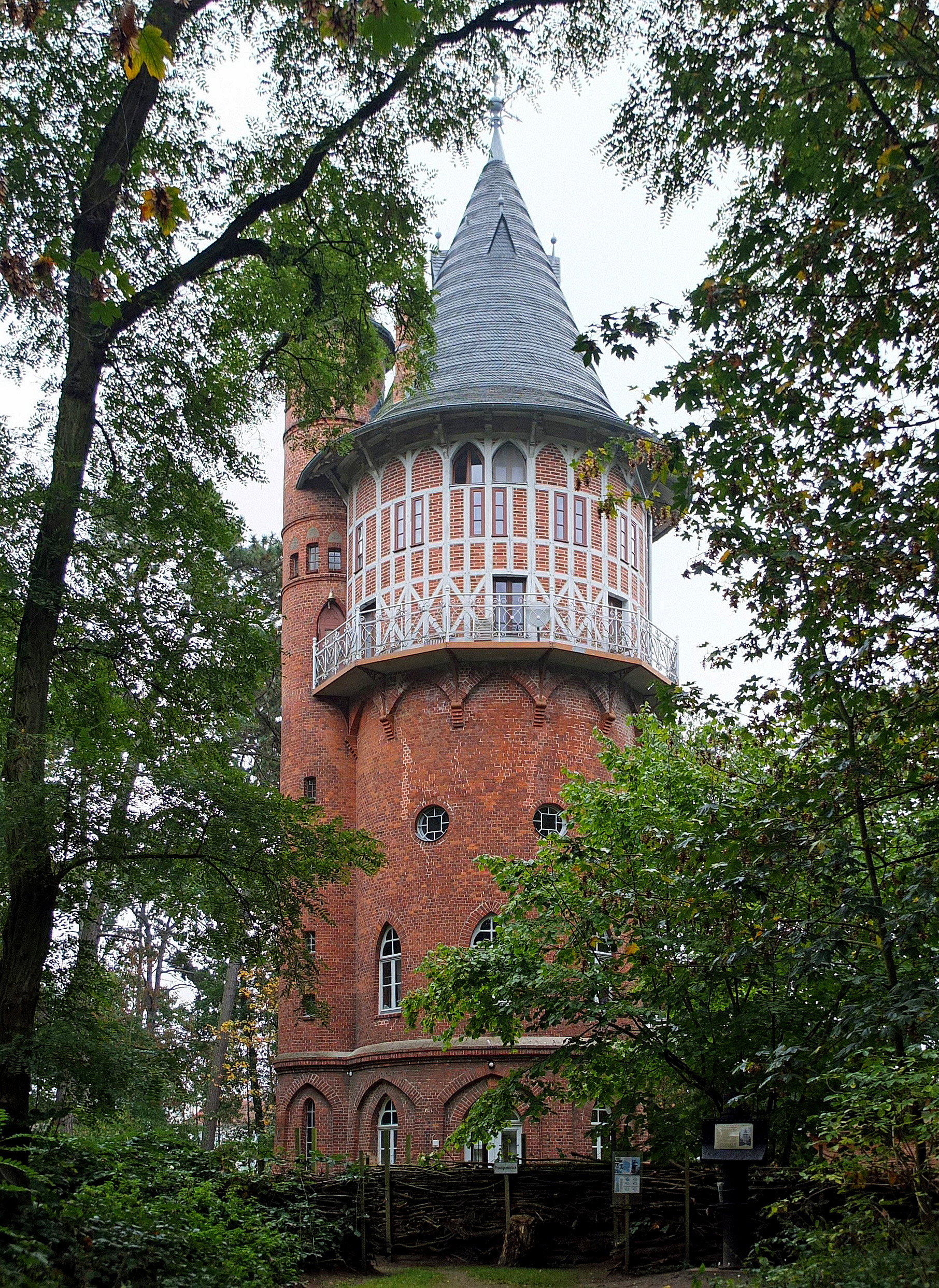 Wasserturm Nesselberg in Waren (Müritz) This is a photograph of an architectural monument.